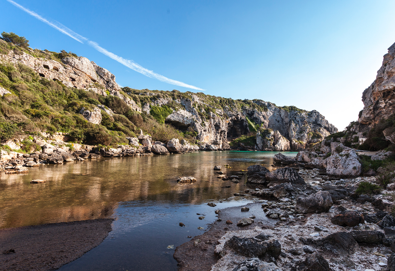 Embarcador i necròpolis de Calescoves